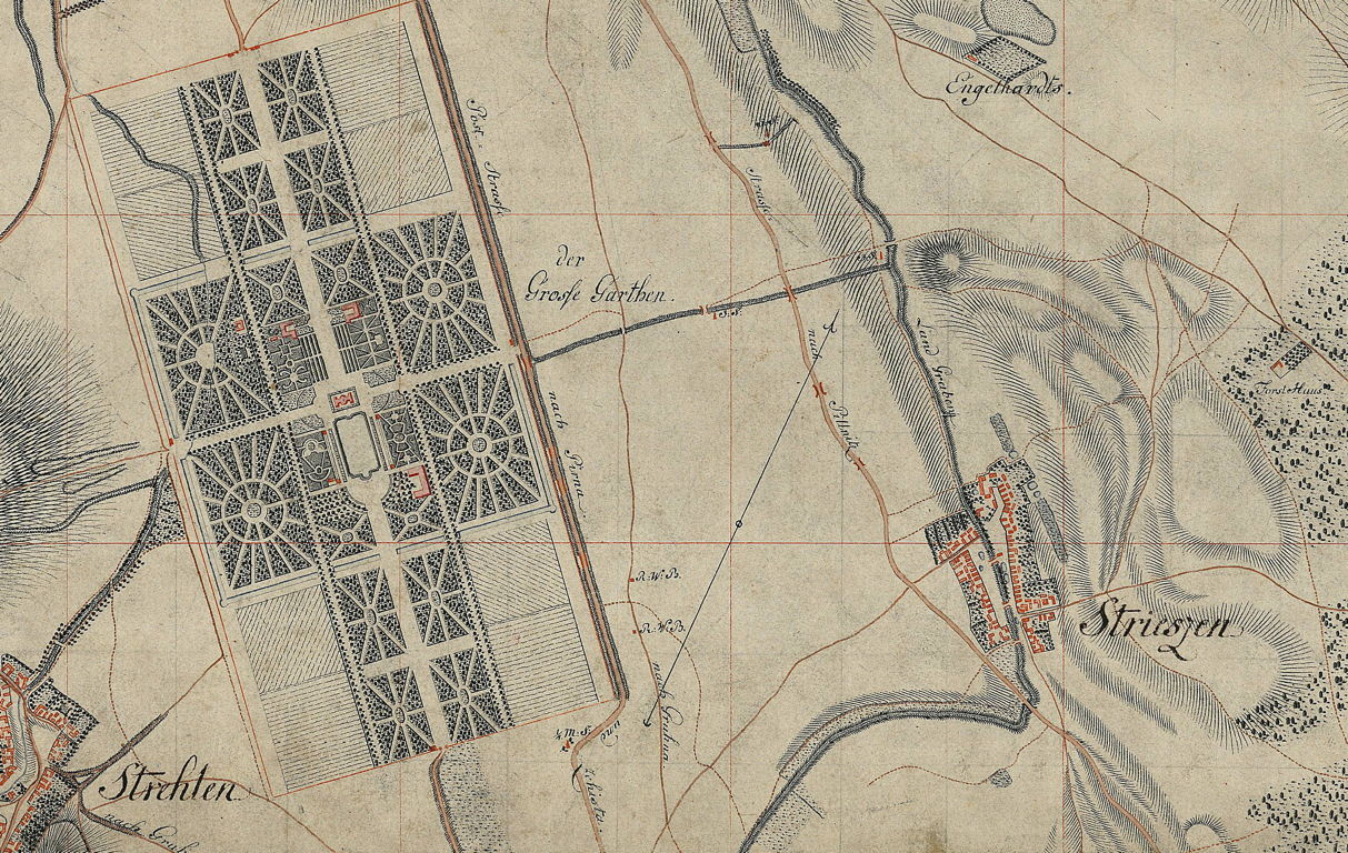 Ausschnitt aus Blatt 262 der Meilenblätter von Sachsen: Großer Garten mit Dorf Striesen